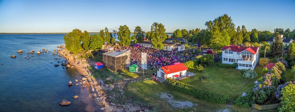 Kaunid Kontserdid Käsmus 2015 Dagö kontsert. Foto: Kaupo Kalda.